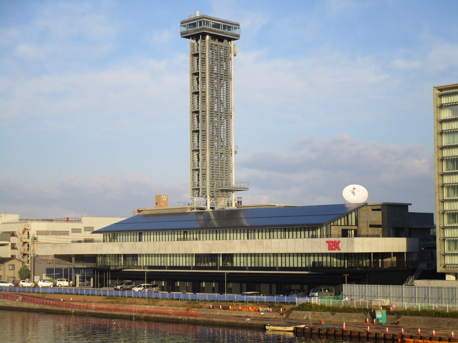 山陰中央テレビジョン放送 本社（松江市向島町、くにびき大橋より撮影）